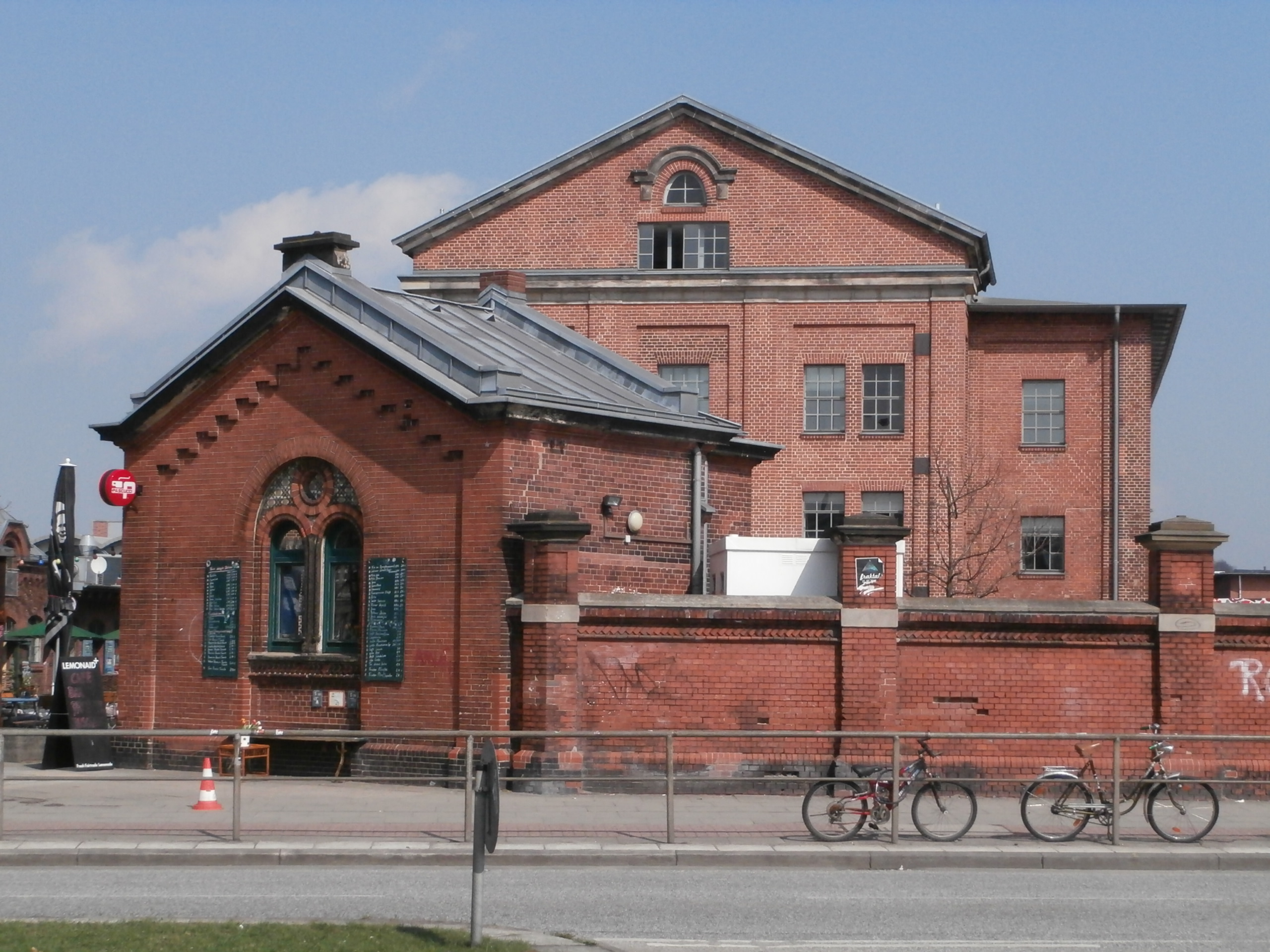 PförtnerhausThis is a photograph of an architectural monument.